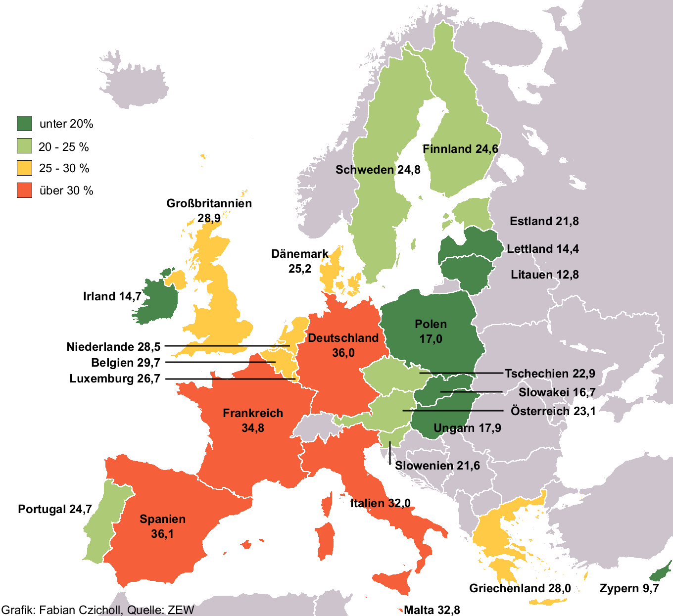 unternehmenssteuersaetzeEU25